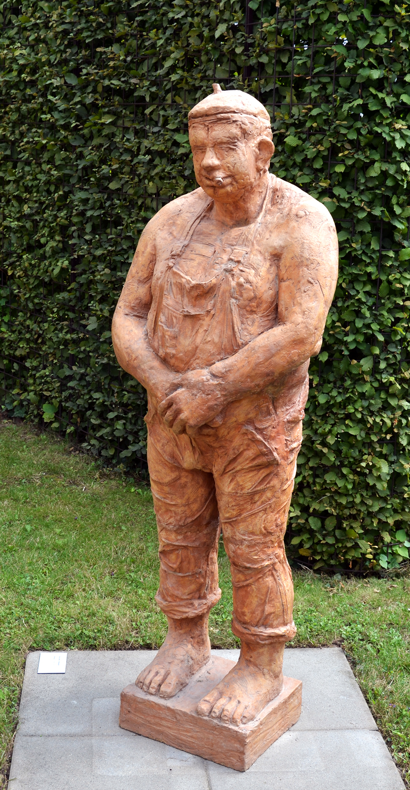 Bohumil Zemánek, Bohouš (1978-1979)